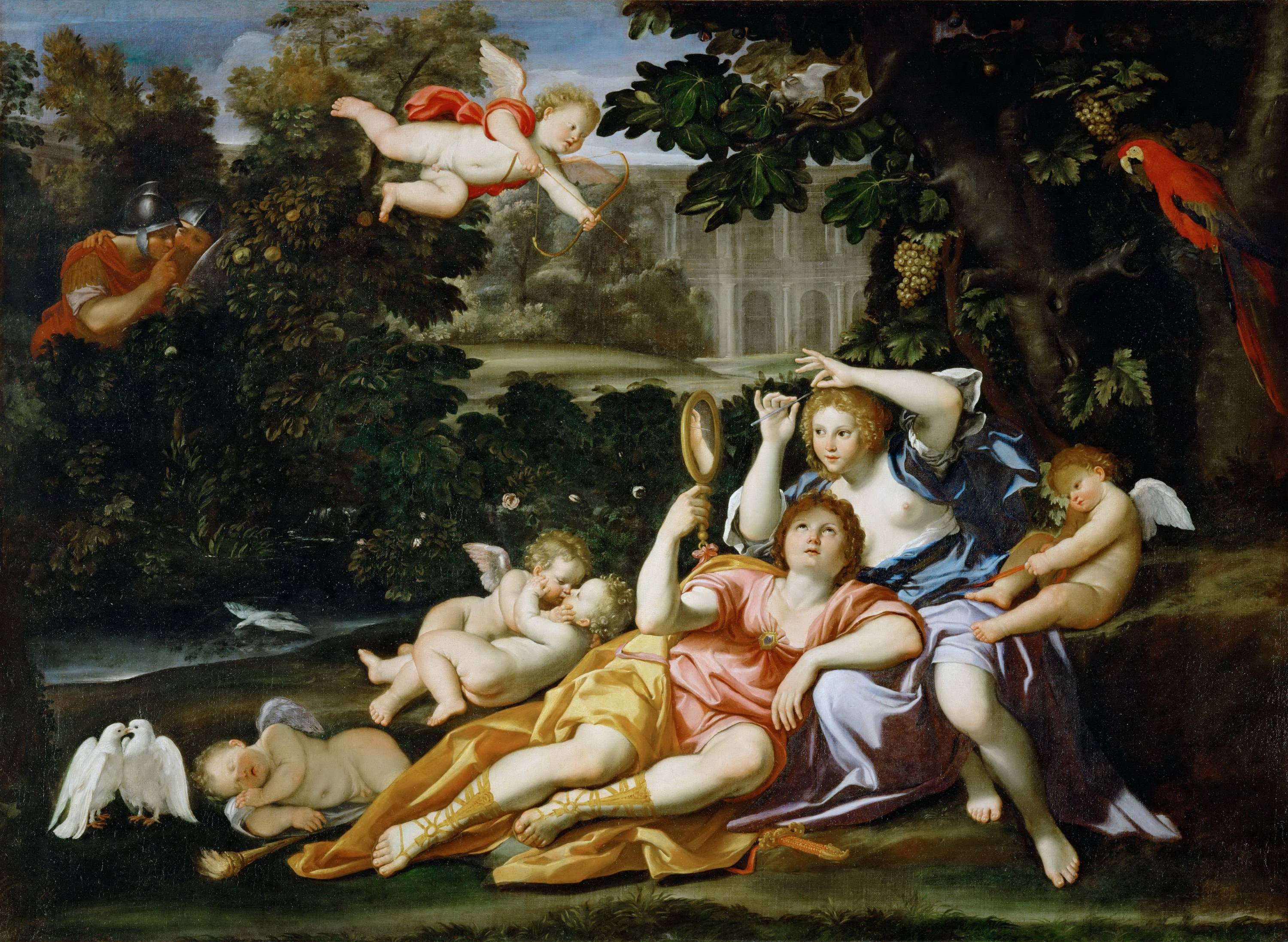 Rinaldo e Armida: quadro appartenuto aal Duca di Mantova Ferdinando Gonzaga, facendo parte della Celeste Galleria